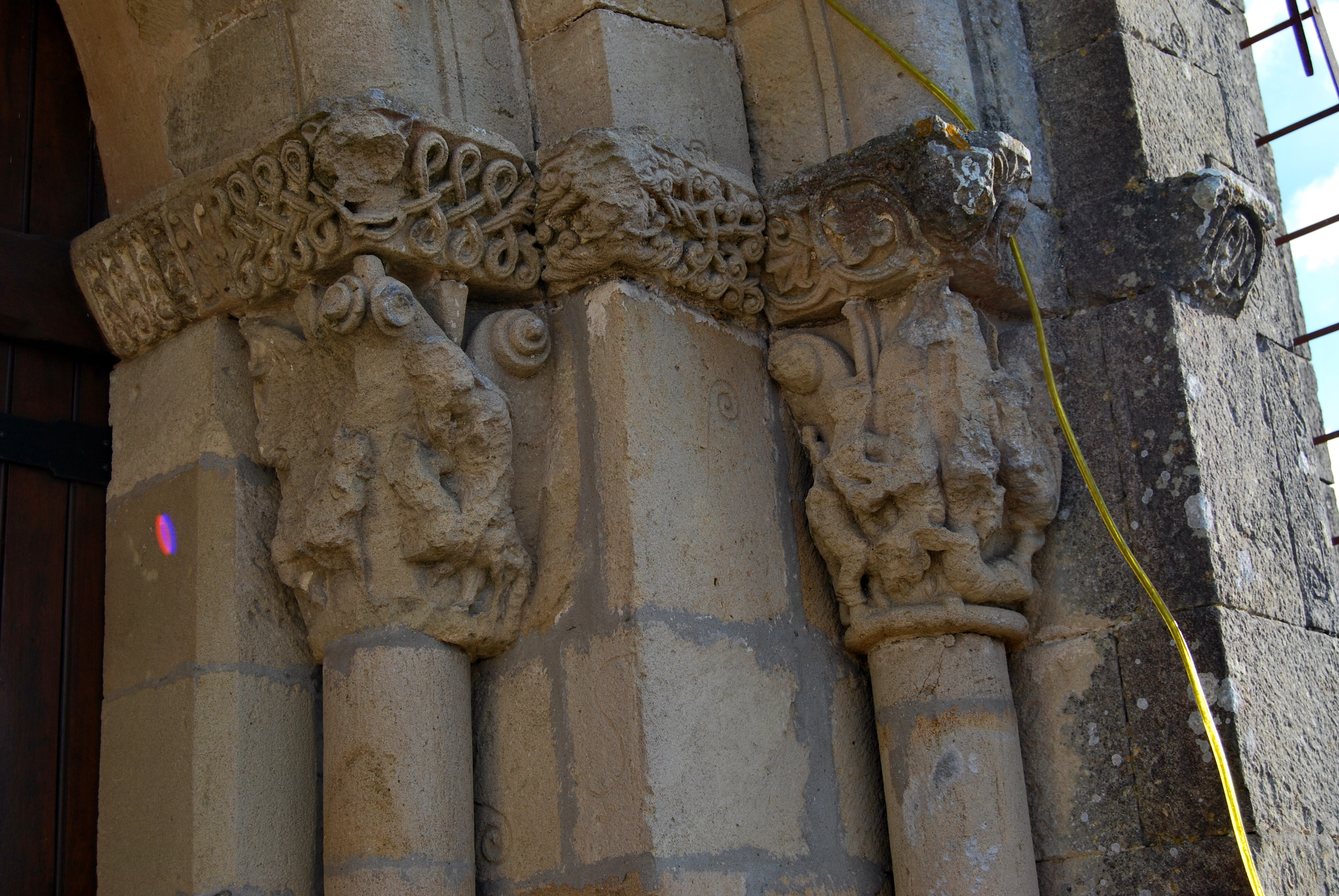 Eglise St Pierre de Mourens